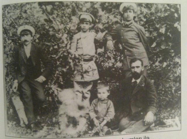 Firidun bəy Köçərli Şuşada qohumları ilə. (Şuşa, 1915).